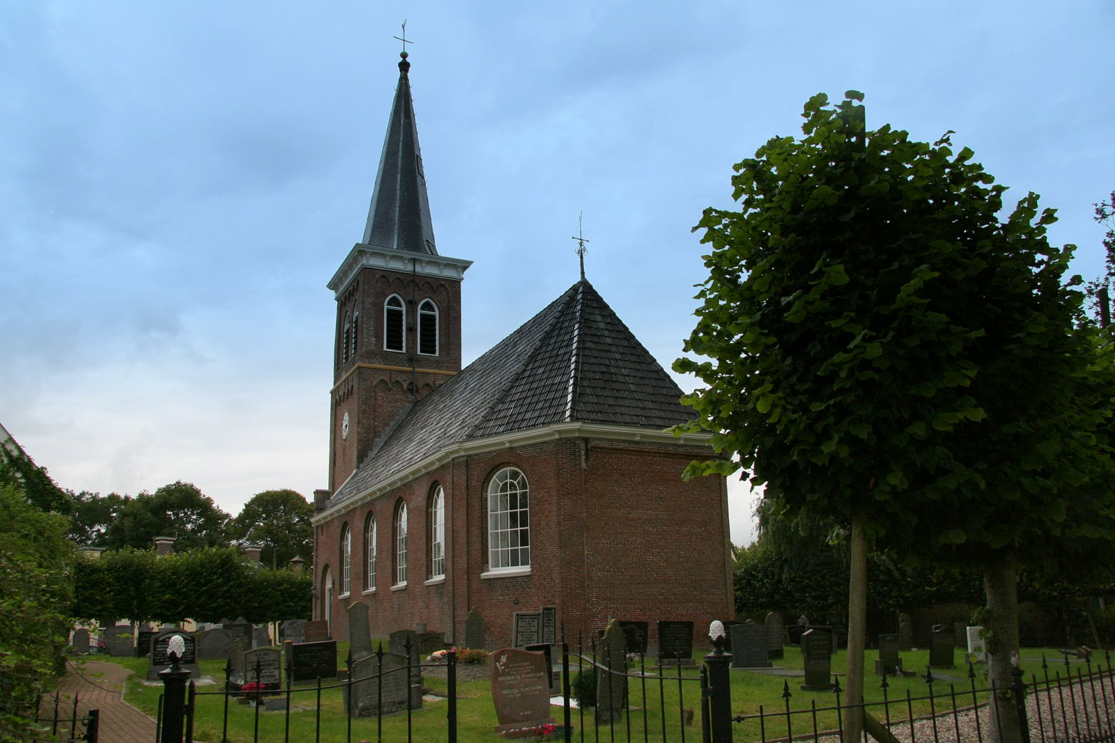 Kerkje van Baard.